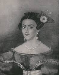 Ilustración de la Heroína.